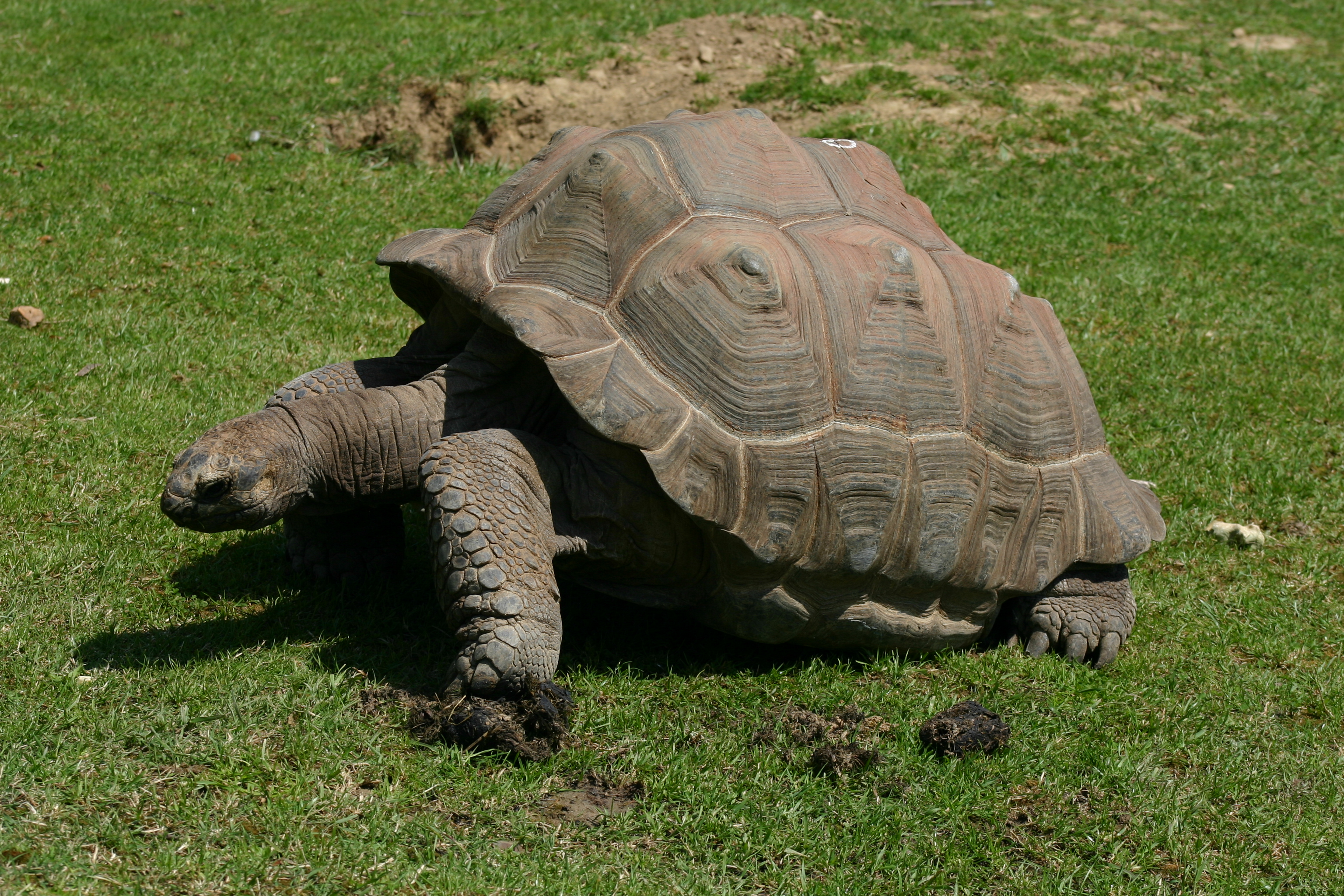 ©éréales Kille® [mailto:cerkil(at)free.fr